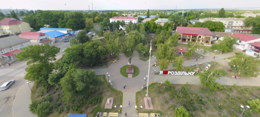 Парк Шевченко с высоты